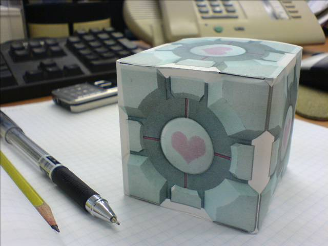 По мотивам отличной игры "Portal" от Valve. Кубик из игры, грубая поделка из бумаги ;) Живёт у меня на столе, я с ним дружу :)))))))